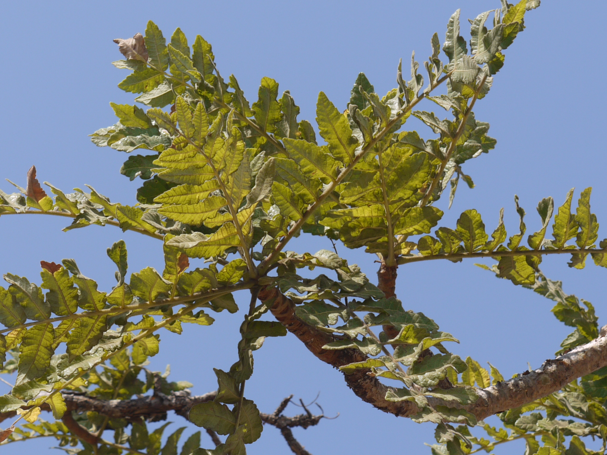 Burseraceae (incense or torchwood family) » Boswellia serrata bos-WELL-ee-a -- named for John Boswell, Scottish botanist and FRCP of Edinburgh sair-AY-tuh or ser-RAT-uh -- toothed like a saw commonly known as: Indian frankincense tree, Indian olibanum tree, salai tree • Gujarati: સાલેડી saaledi, સલાઈ ગૂગળ salaai gugul • Hindi: शल्लकी shallaki • Kannada: ಗುಗ್ಗುಳ ಮರ guggula mara • Malayalam: കുങ്ങില്യം kungilyam • Marathi: धुपाळी dhupali, धूपसाळी dhupasali, कुरुंद kurunda, सालफळी salaphali, साळई salai, साळी sali • Oriya: salai • Pali: सल्लकी sallaki • Punjabi: ਸਾਲ੍ਹੇ salhe, ਸਾਲਹੀ salhi • Sanskrit: भीषण bhishan, गुग्गुल guggula, हस्तिनशना hastinashana, पालंक palank, पार्वती parvati, ऱ्हादिनी hradini, कुरुन्द kurunda, सल्लकी sallaki, शल्लकी shallaki, स्रुवा sruva • Tamil: குமஞ்சம் kumancam, குங்கிலியம் kunkiliyam, மரத்துவெள்ளை marattu-vellai, பறங்கிச்சாம்பிராணி paranki-c-campi-rani, வெள்ளிக்கீரை vellai-k-kirai • Telugu: గుగ్గిలము guggilamu, పరంగిసాంబ్రాణిచెట్టు parangi-sambrani-chettu, సల్లకి sallaki ... the resin obtained from this tree is commonly known as: Indian olibanum, Indian frankincense, Konkani resin • Arabic: لبان luban • Hindi: कुंदर kundar, लोबान loban, मकन्द makand, मकुन्द makund • Kannada: ಚಿಲಕದೂಪ chilakadupa, ಧೂಪ dhupa, ಗುಗ್ಗುಳ guggula, ಹಾಲು ಮಡ್ಡಿ haalu maddi, ಲೋಬಾನ lobaana, ಪರಮ್ಗಿ ಸಾಮ್ಬ್ರಾಣಿ paramgi saambraani • Konkani: लोभान lobhan • Marathi: लोभान lobhan • Persian: گنده فيروزه gandha firoza, لوبان loban • Punjabi: ਲੋਬਾਣ loban • Sanskrit: द्विज dvija, कुन्दुर kundur, कुन्दुरु kunduru, मुकुन्दः mukundah, पालंकी palanki, पालंक्या palankya, सुरभी surabhi, तुरुष्क turushka • Telugu: కుందురువు kunduruvu • Urdu: لوبان loban Endemic to: India References: Flowers of India • NPGS / GRIN • DDSA